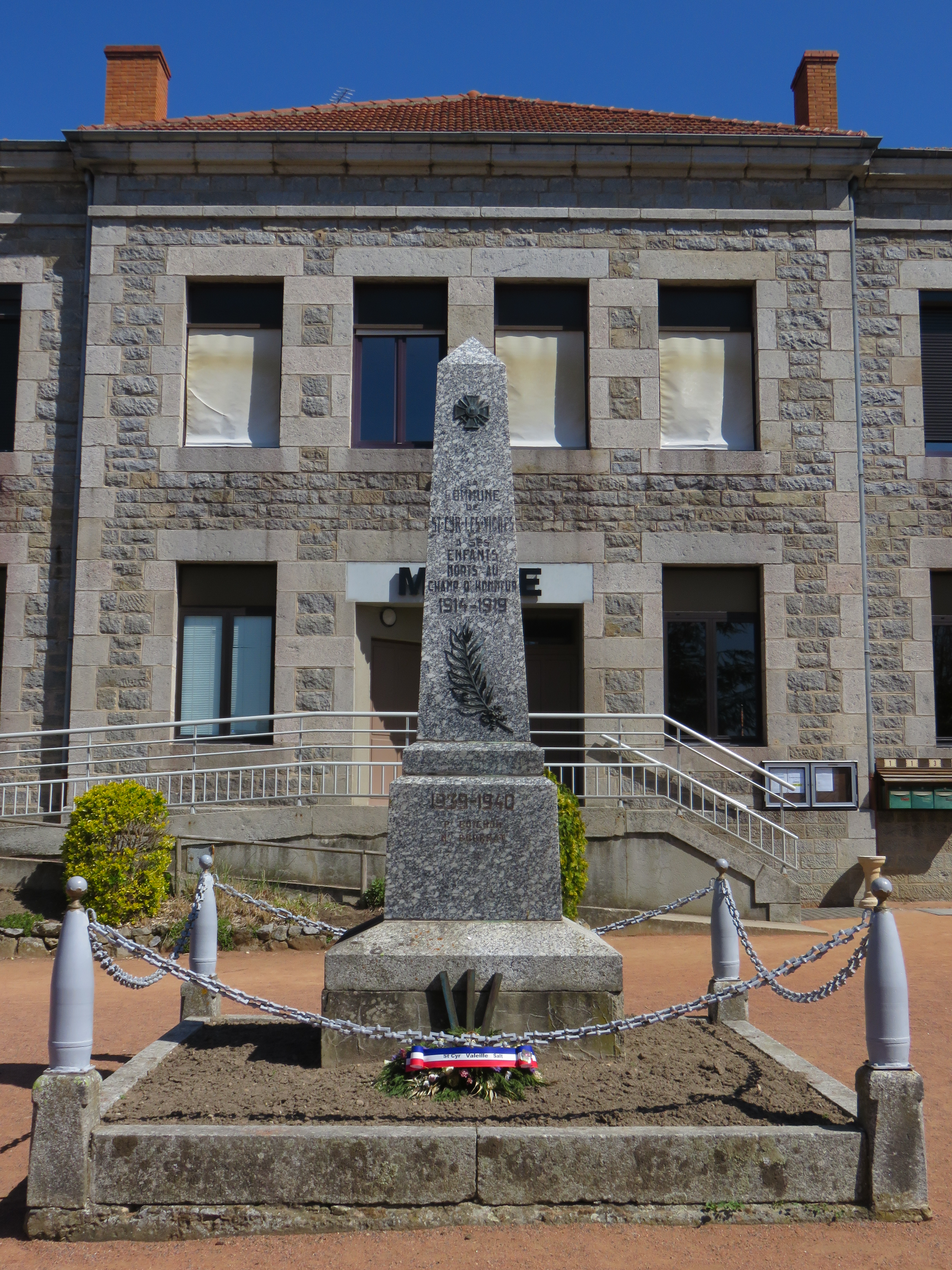 Monument aux morts devant la mairie de Saint-Cyr-les-Vignes (Loire, France).